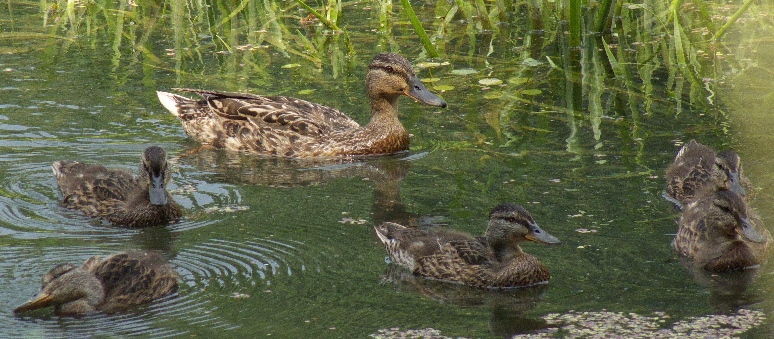 Утка-кряква с утятами на пруду в ЦСБС.